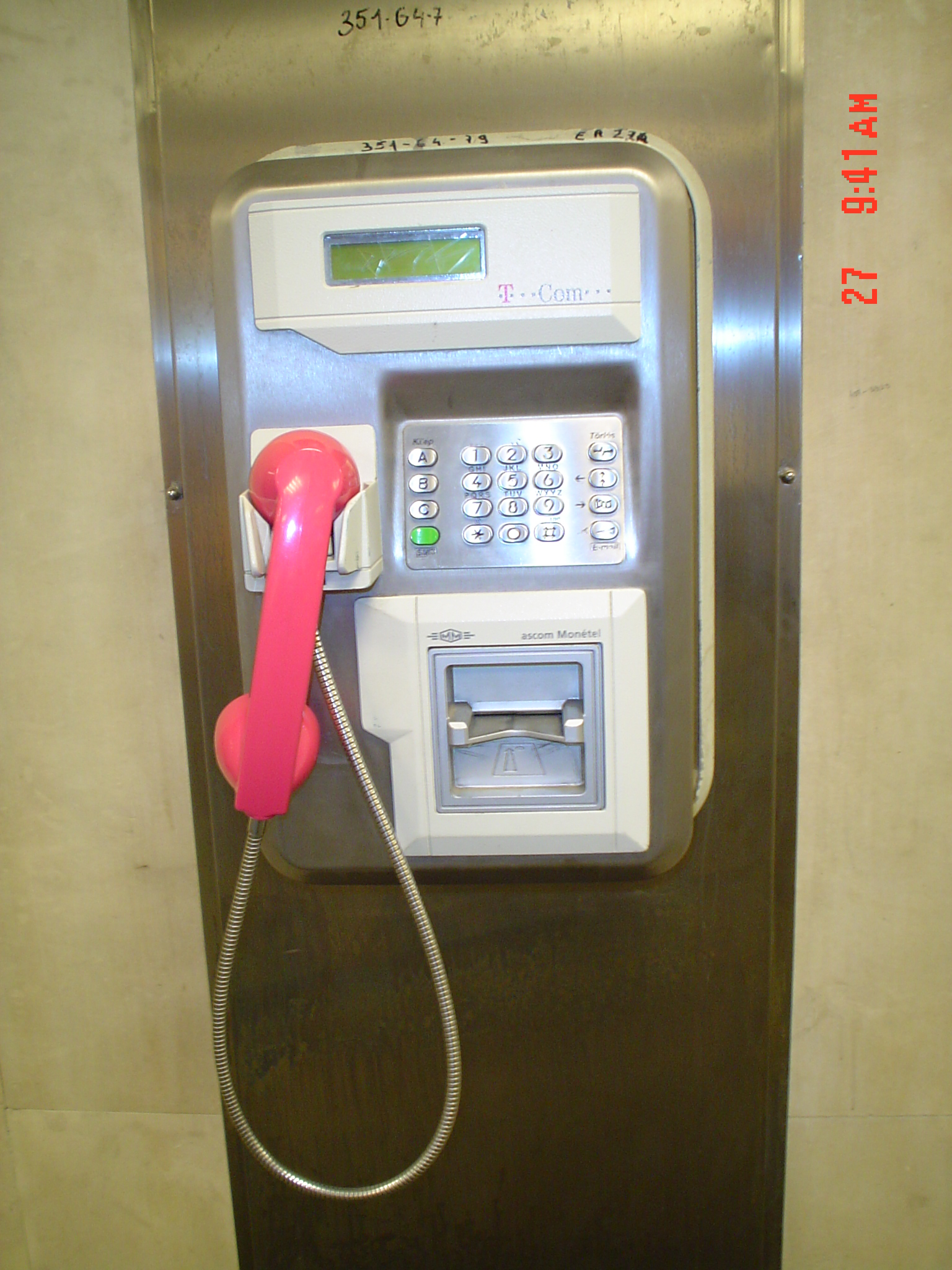 Publika karta fenestra surstrata telefono